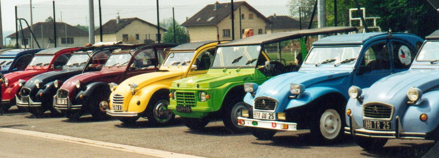 exposition de voitures (Citroën 2CV) pendant une rencontre. 1993